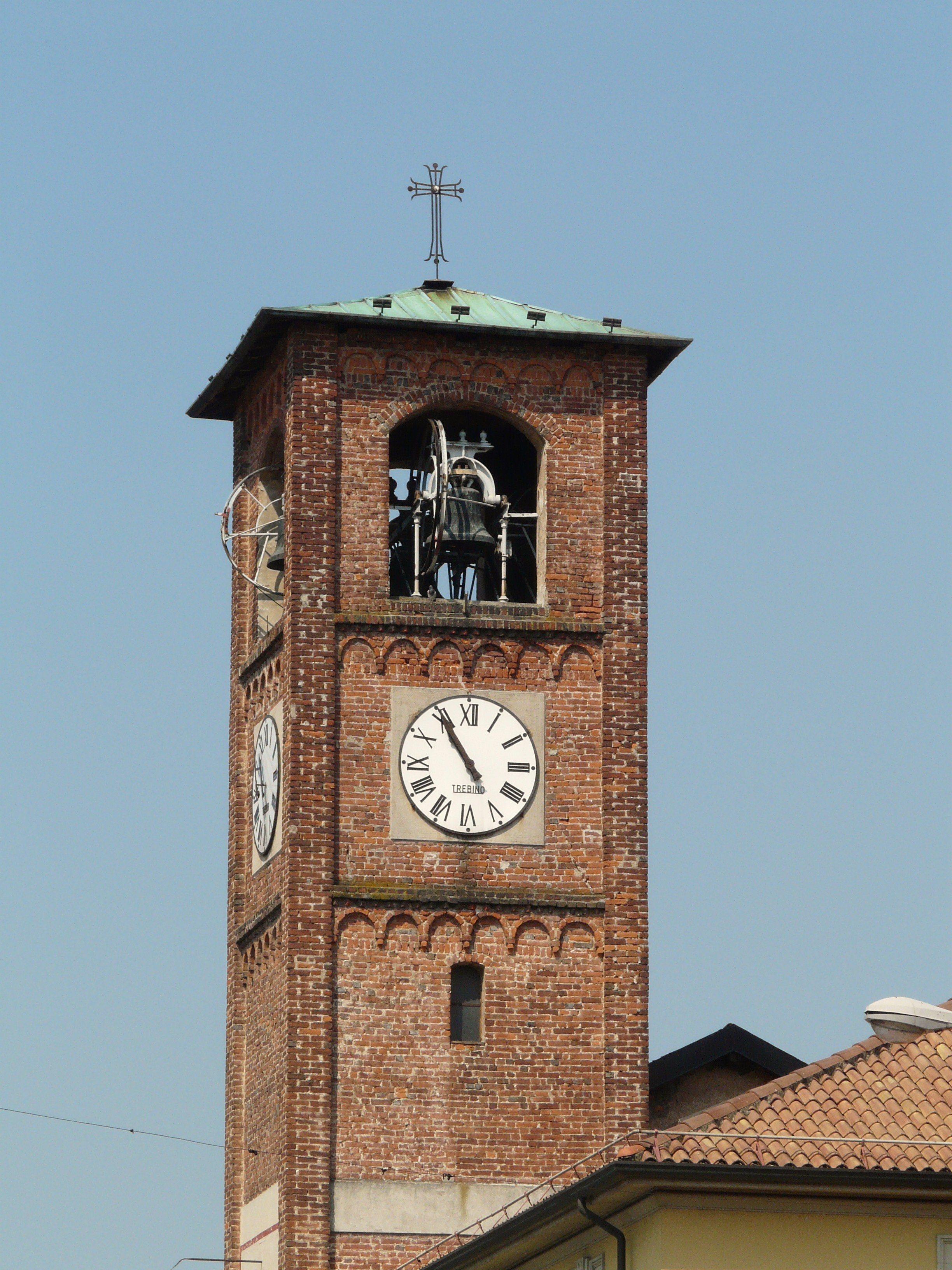 Campanile della chiesa di Santa Maria Assunta dei Padri Celestini, Magenta, Lombardia, Italia